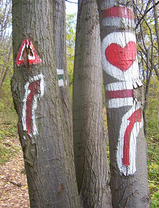 Orijentacioni zanci za Fruškogorski maraton